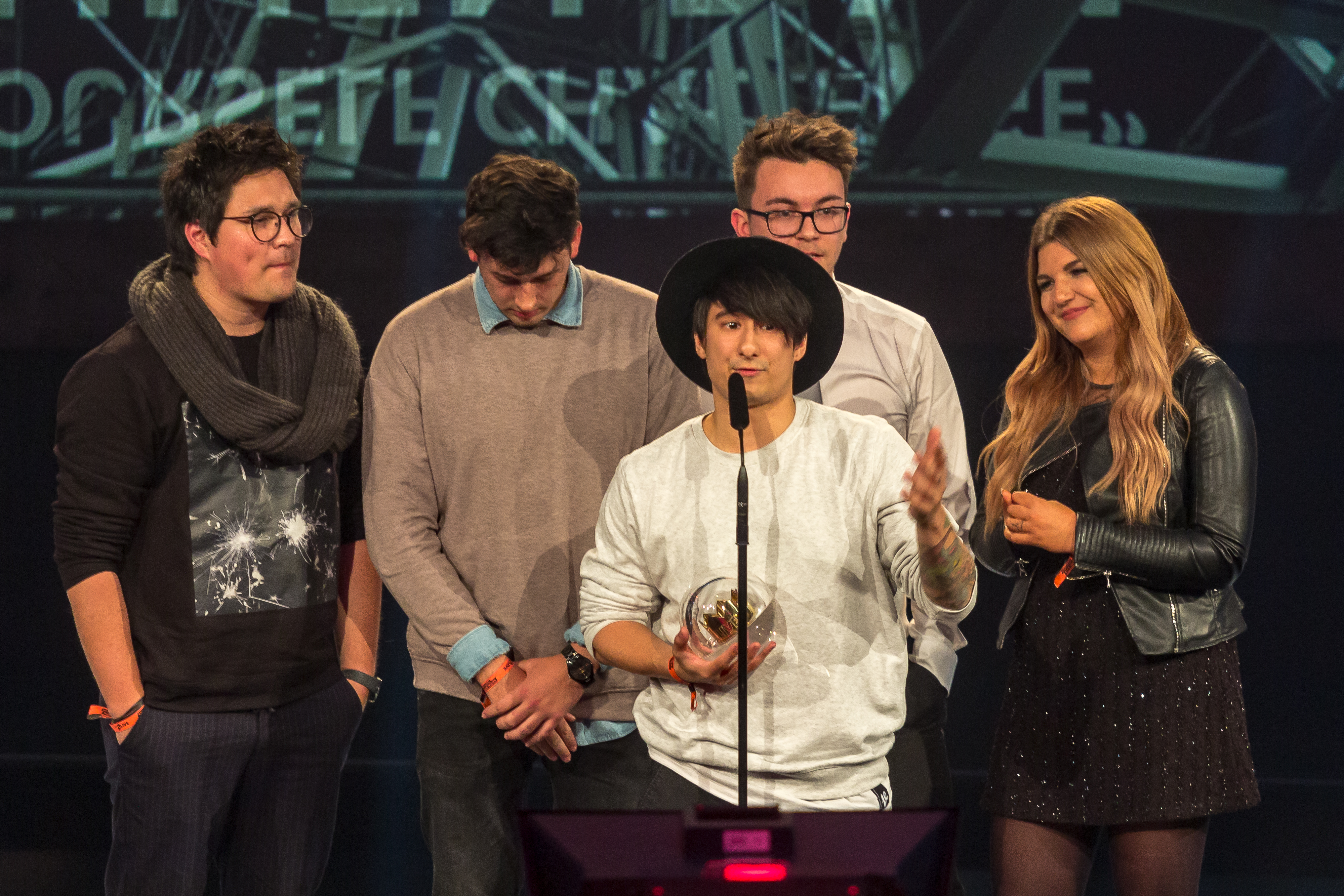 1LIVE Krone 2016 - 2015 - Show - Video-Krone: Julien Bam